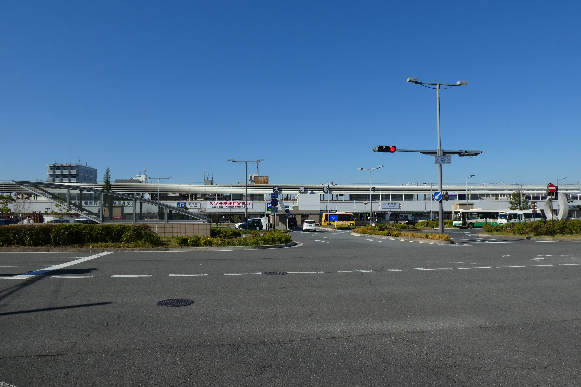 JR、近鉄天理駅。